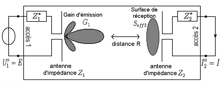 Schéma électrique explicatif.